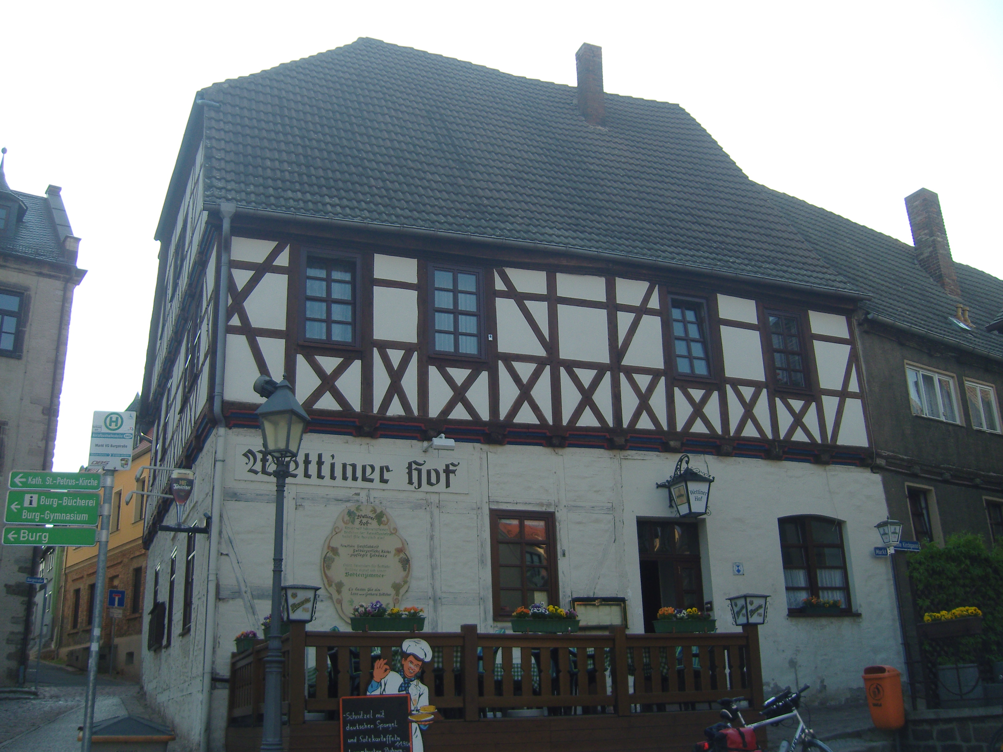 Haus am Markt in Wettin